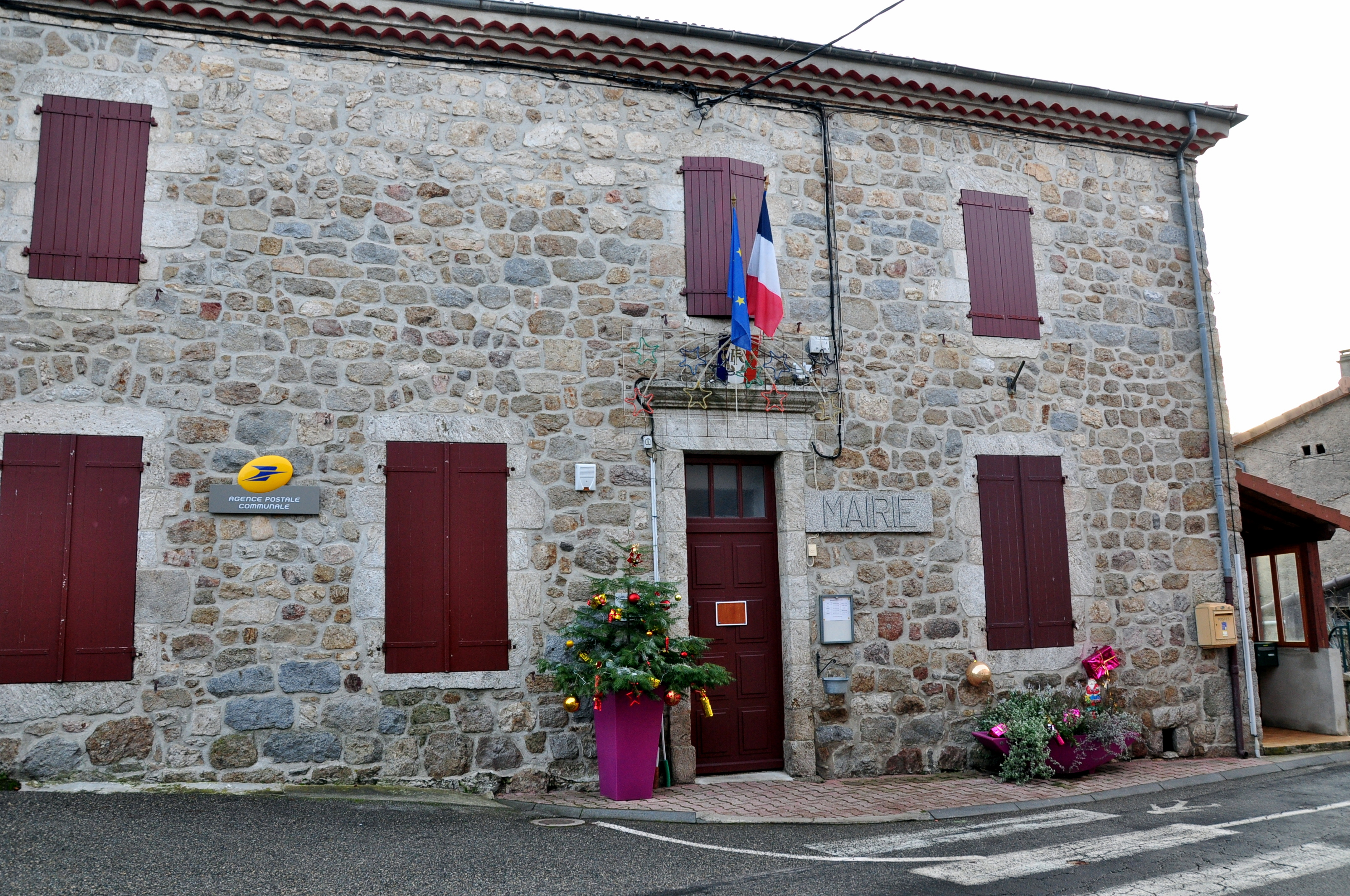 Mairie de Saint-Barthélemy-le-Meil.